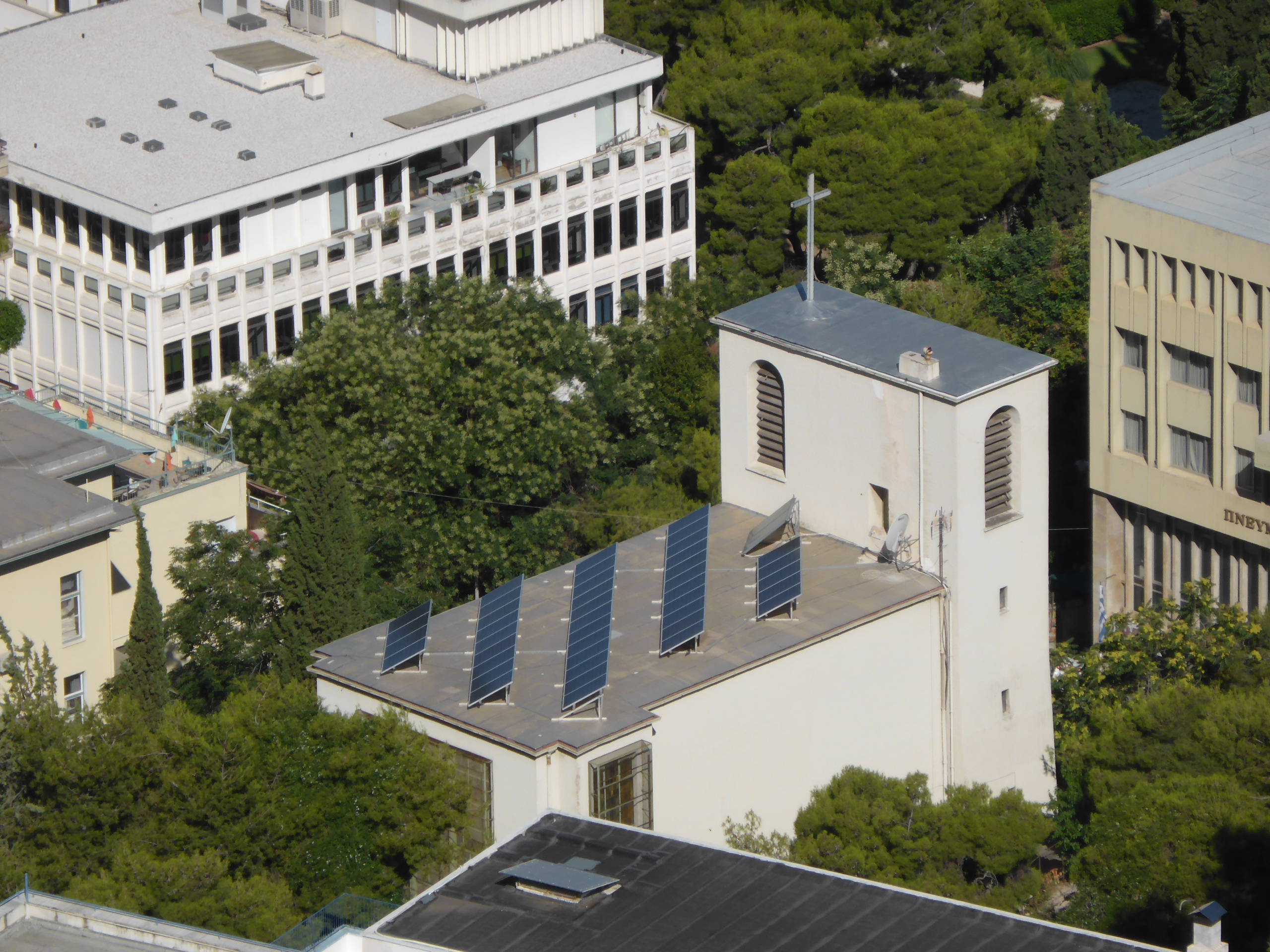 Deutsche ev. Kirche in Athen